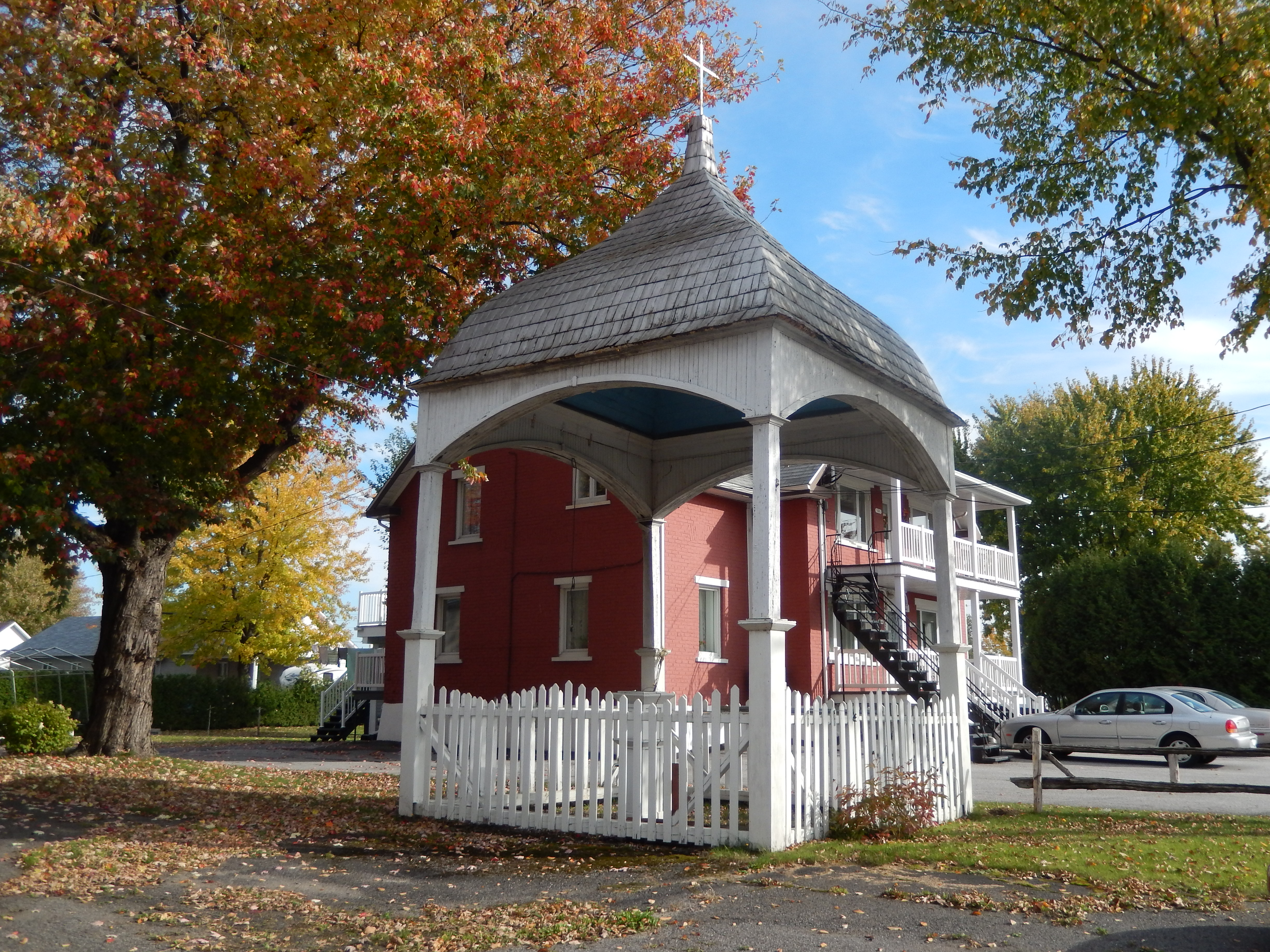 Calvaire Albert-Mondoux à Yamaska, sans le christ